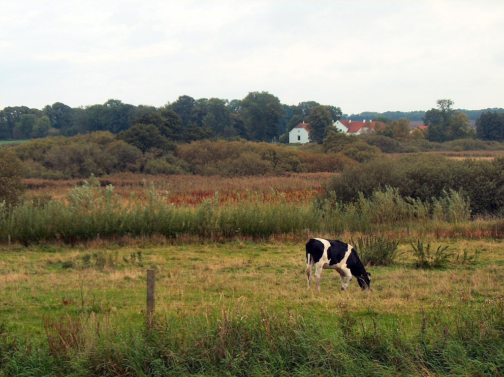 Urup Herregård set fra naturstien Horsens-Silkeborg